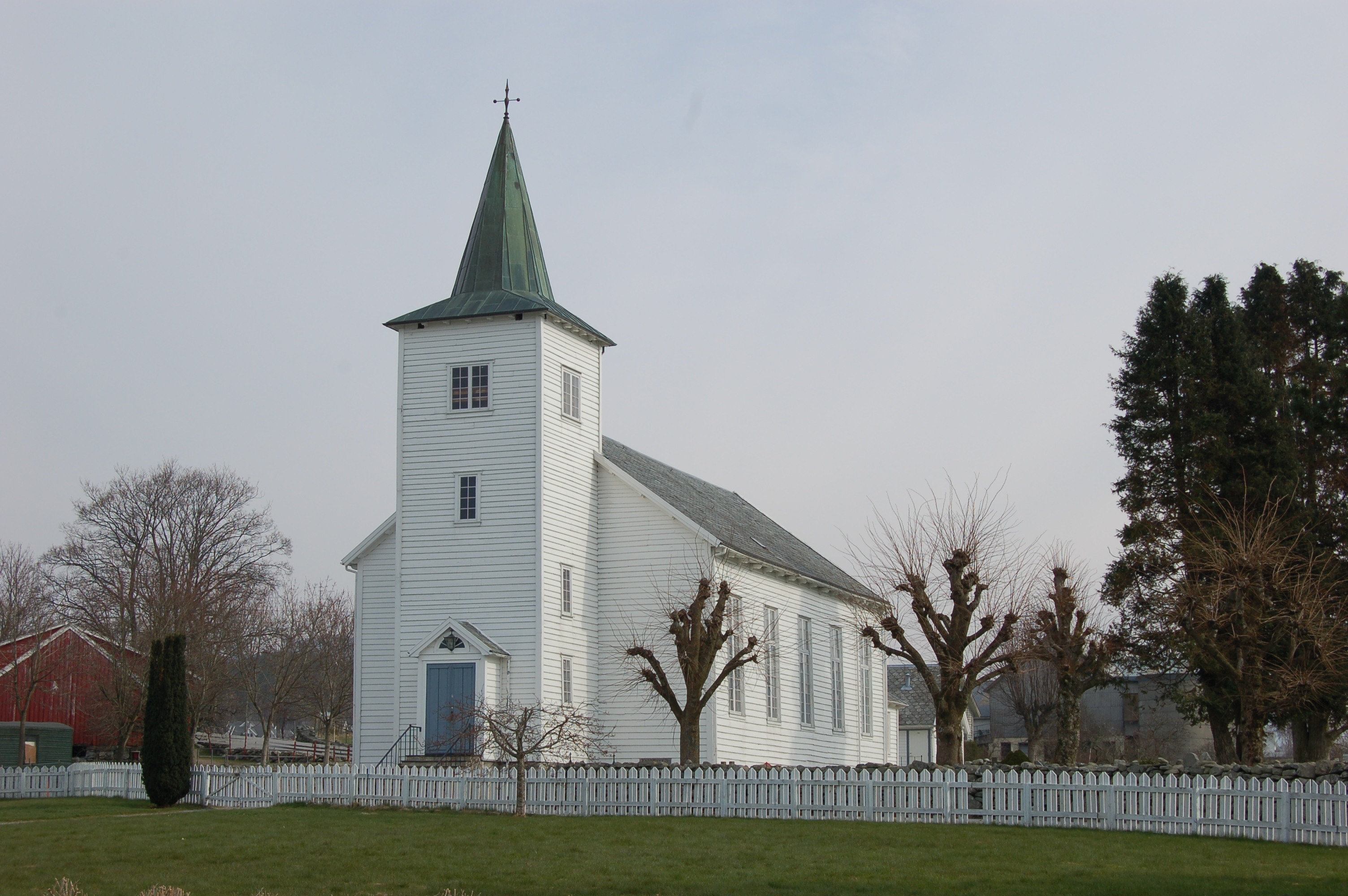 Strand kirke, Strand, Norway